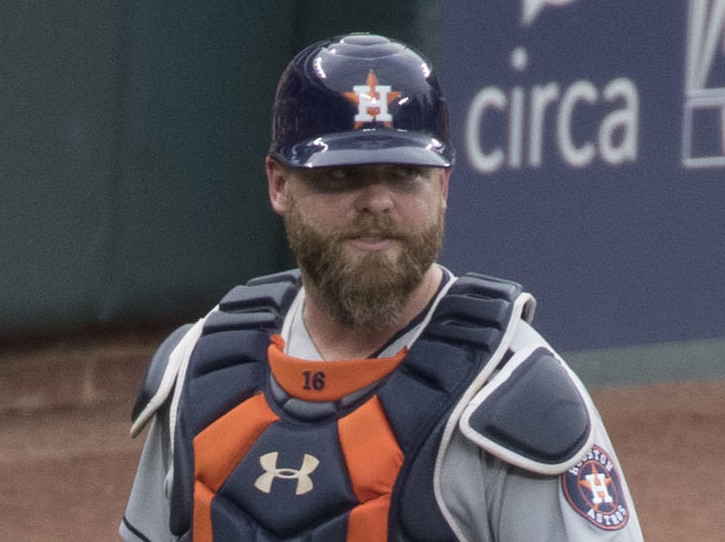 Astros at Orioles 7/21/17